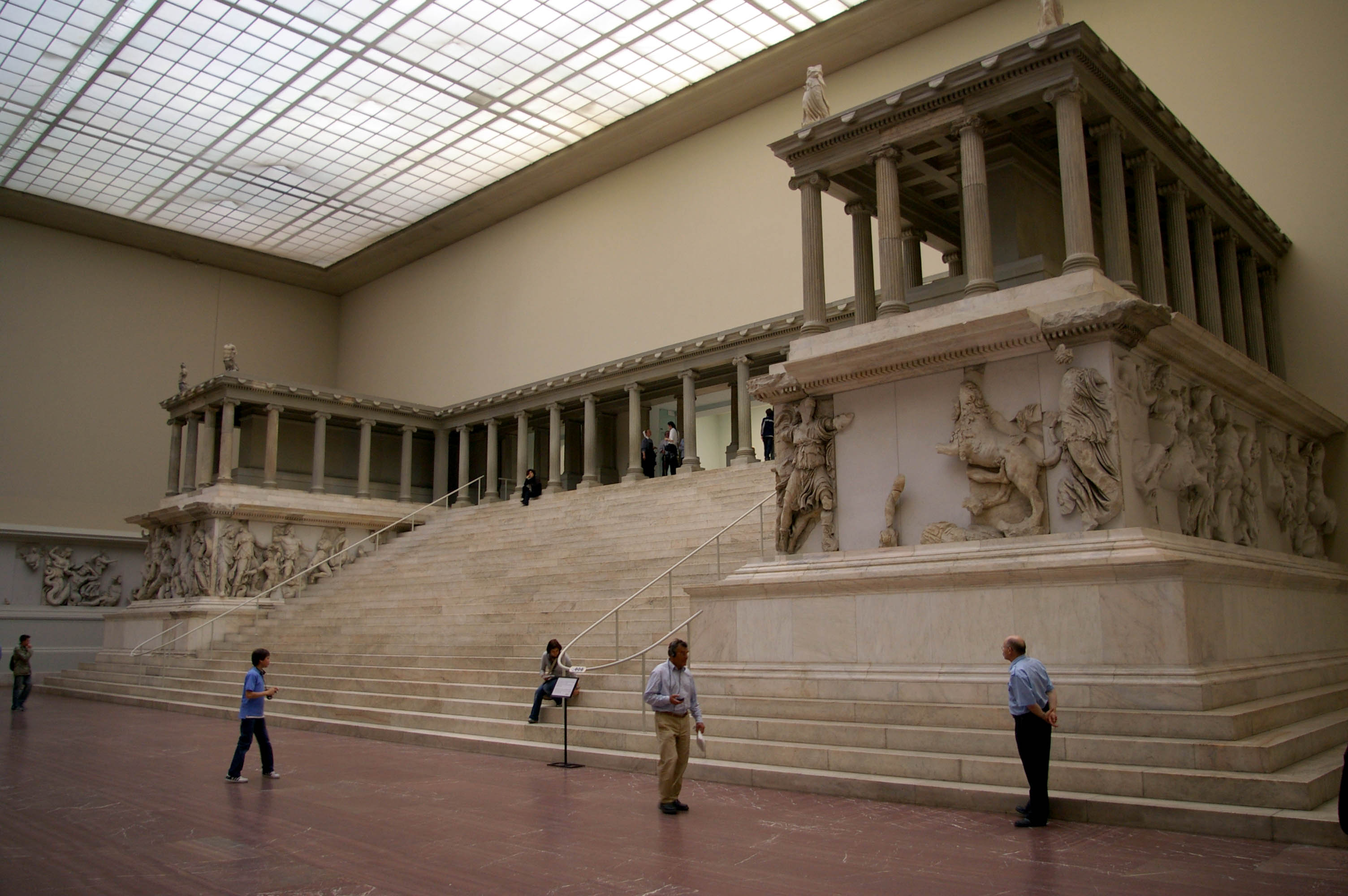 Pergamonský oltář (Berlín)